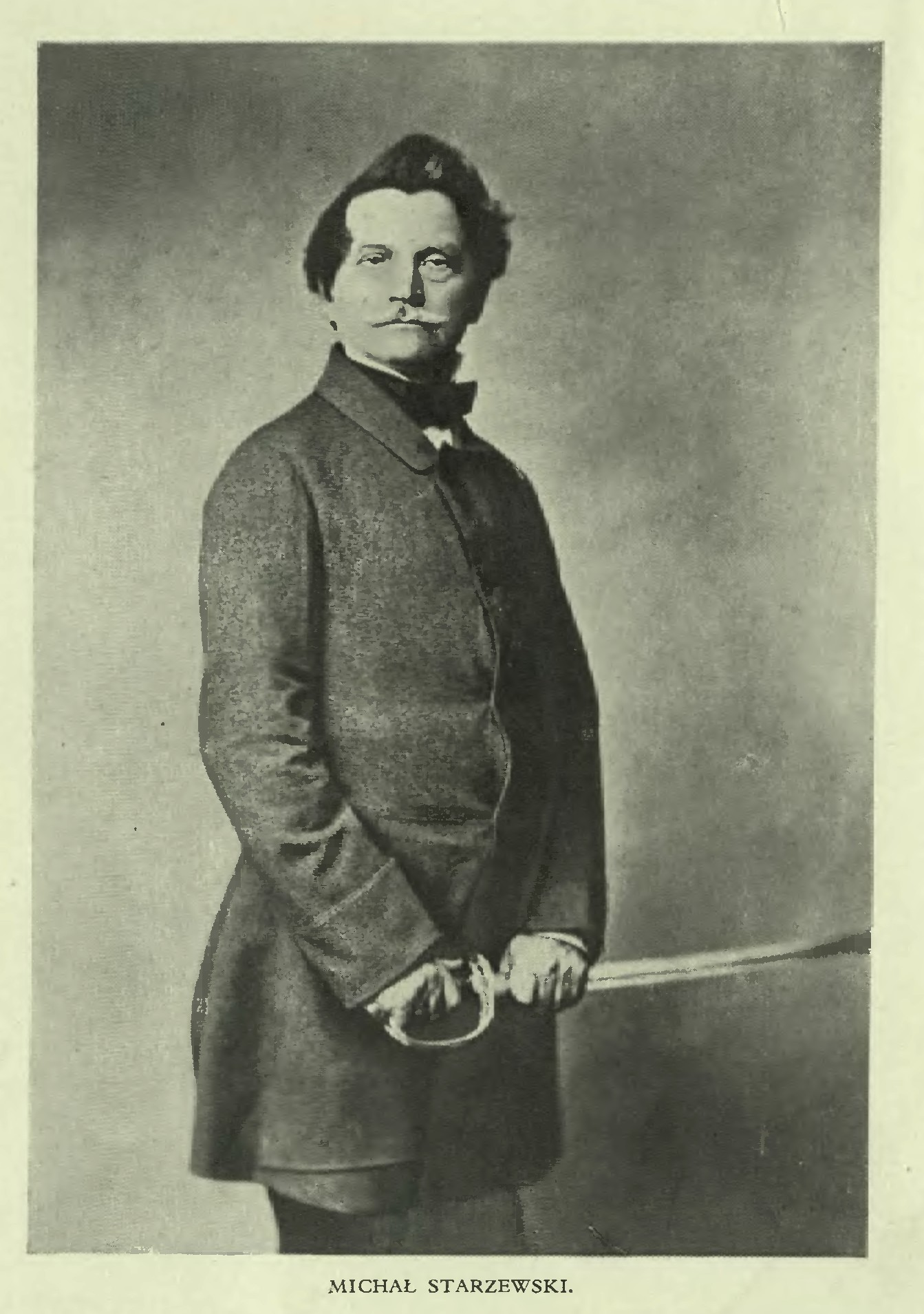 Michał Starzewski - Ze wspomnień o Michale Starzewskim. Kraków 1932.